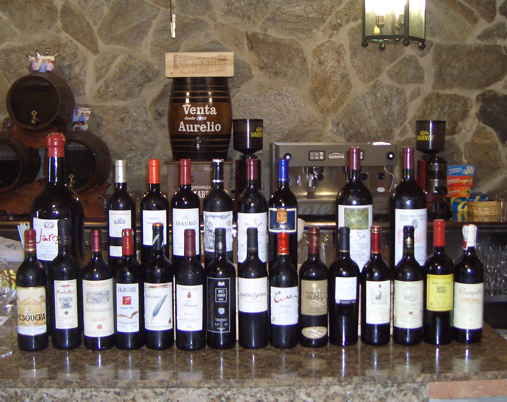 Carta de vinos de Venta Aurelio